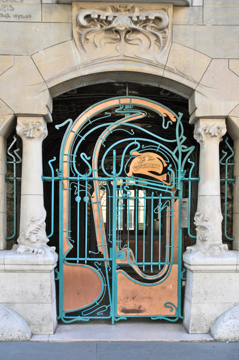 Le portail d'entrée du Castel Béranger est caractéristique du style art nouveau en fouet d'Hector Guimard, il associe des plaques de cuivre poli à des ferronneries de couleur bleu-vert. Le Castel Béranger est un immeuble de rapport de trente-six appartements (à loyer modéré à l'origine) situé 14, rue La-Fontaine dans le 16e arrondissement de Paris. Il a été conçu par l'architecte Hector Guimard qui y avait installé ses bureaux. Sa construction a lieu à partir de 1895 jusqu'en 1898. C'est un chef d'oeuvre d'art nouveau français. Hector Guimard y applique un principe fondamental de l’Art nouveau : celui de l’unité complète de l’œuvre. Il est également, et comme à son habitude, l'auteur du second-œuvre et de la décoration intérieure (sols, menuiserie, serrurerie, vitrerie et vitrail, peinture, tapisserie et papier-peint) mais aussi du mobilier. On retrouve à l'extérieur plusieurs thèmes chers à l'auteur : le bow-window, la loggia, le balcon et la ferronnerie ouvragée. L’immeuble est primé au 1er concours de façades de la Ville de Paris en 1898, mais cette nomination est critiquée. extrait de Wikipedia